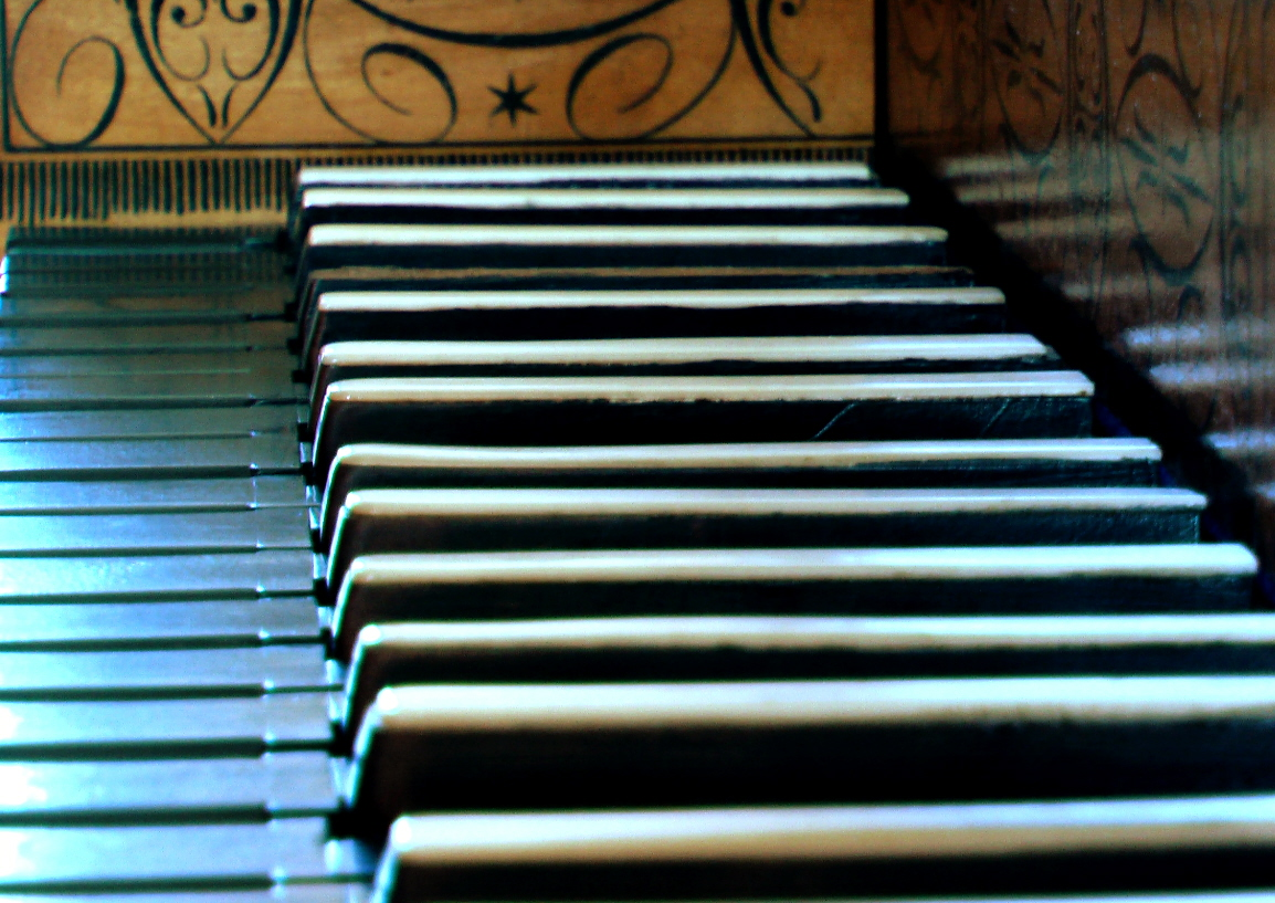 Orgel der Auernheimer St. Georgskirche - Manual